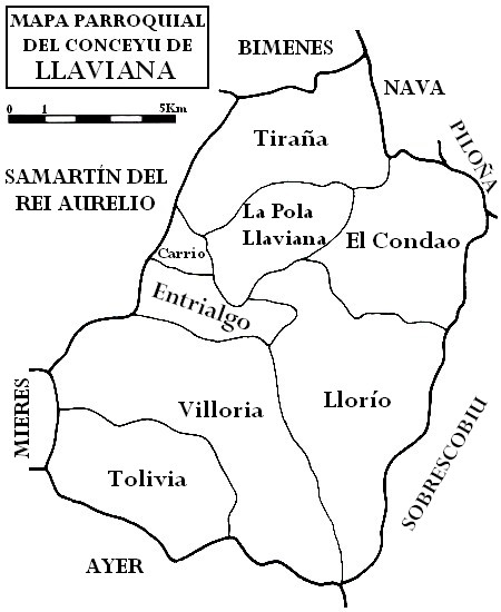 Mapa parroquial del conceyu de Llaviana.